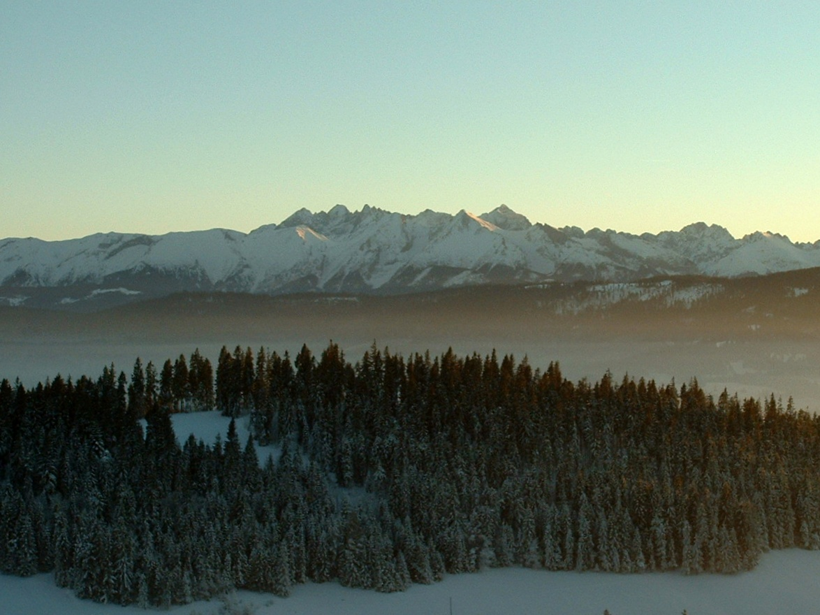 Żar (Pieniny)